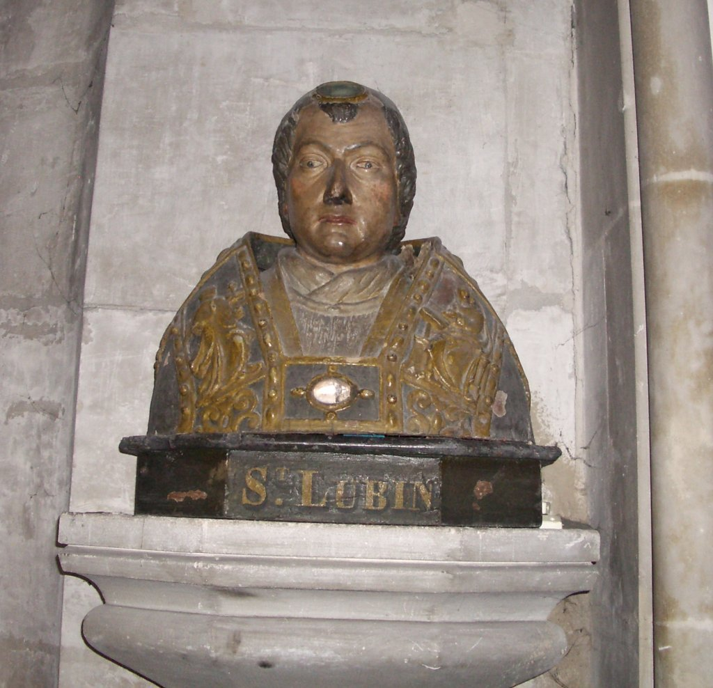 Buste de Saint Lubin dans l'église N-D de Louviers